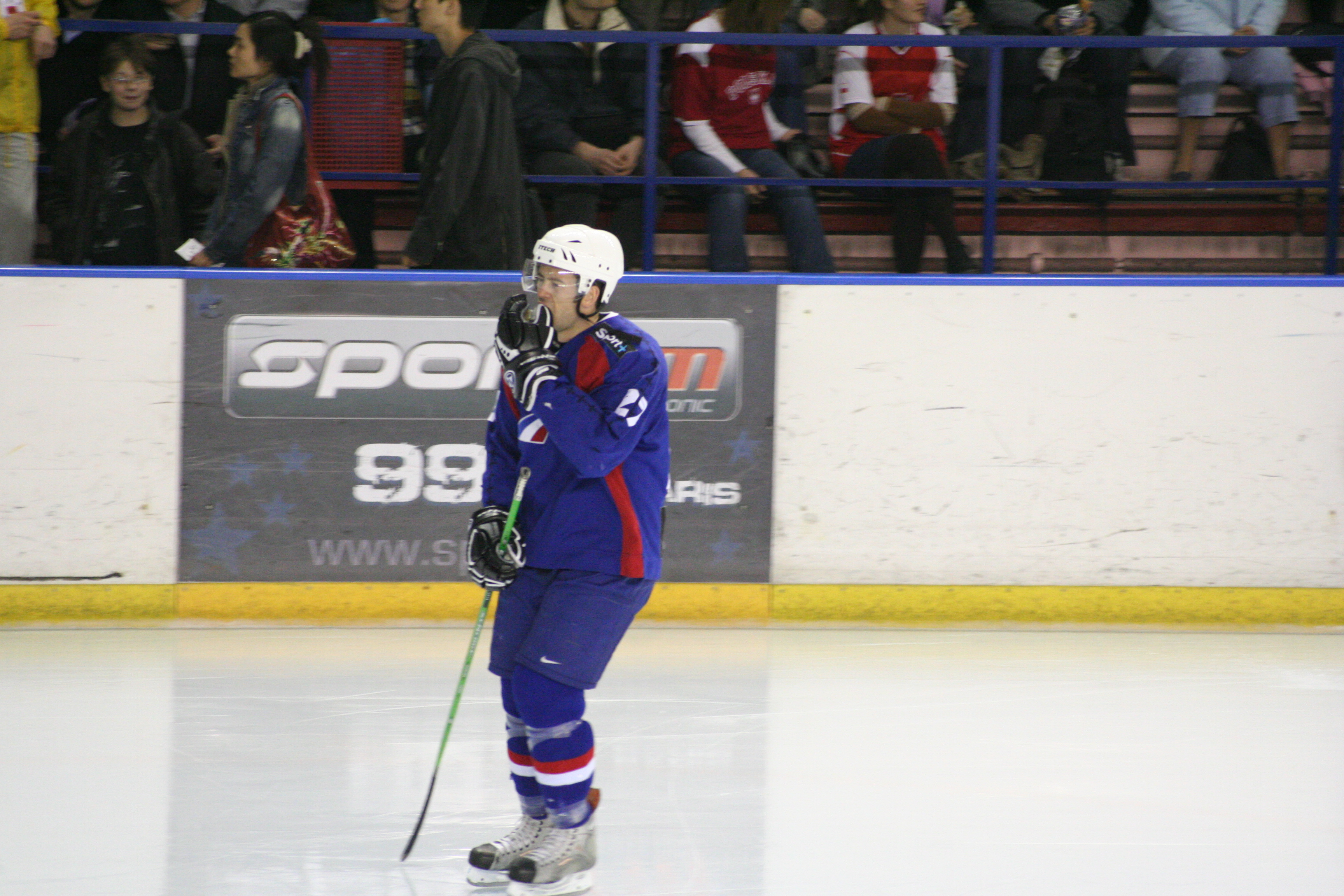 match de hockey sur glace, France - Pologne, Baptiste Amar